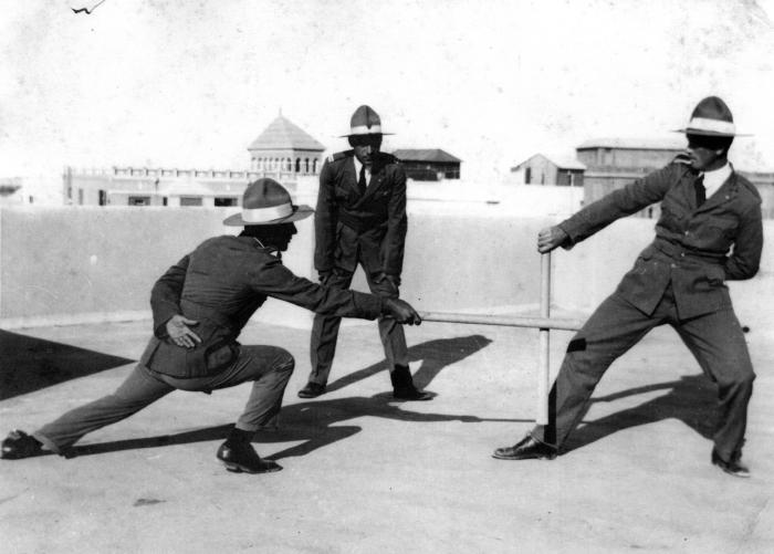 ירמיהו הלפרין ומשה מטסובסקי באימון סיוף במקלות בבית הספר הראשון למדריכים של בית"ר ארץ-ישראל